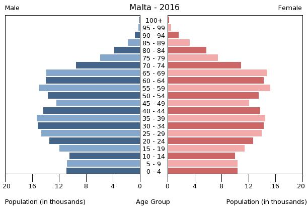 A population pyramid illustrates the age and sex structure of a country's population and may provide insights about political and social stability, as well as economic development. The population is distributed along the horizontal axis, with males shown on the left and females on the right. The male and female populations are broken down into 5-year age groups represented as horizontal bars along the vertical axis, with the youngest age groups at the bottom and the oldest at the top. The shape of the population pyramid gradually evolves over time based on fertility, mortality, and international migration trends.